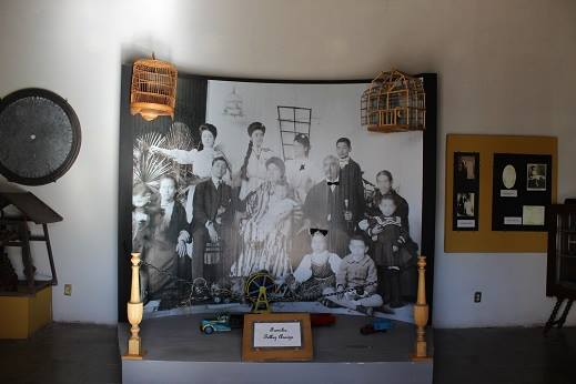 Diorama de la Familia Téllez Araiz